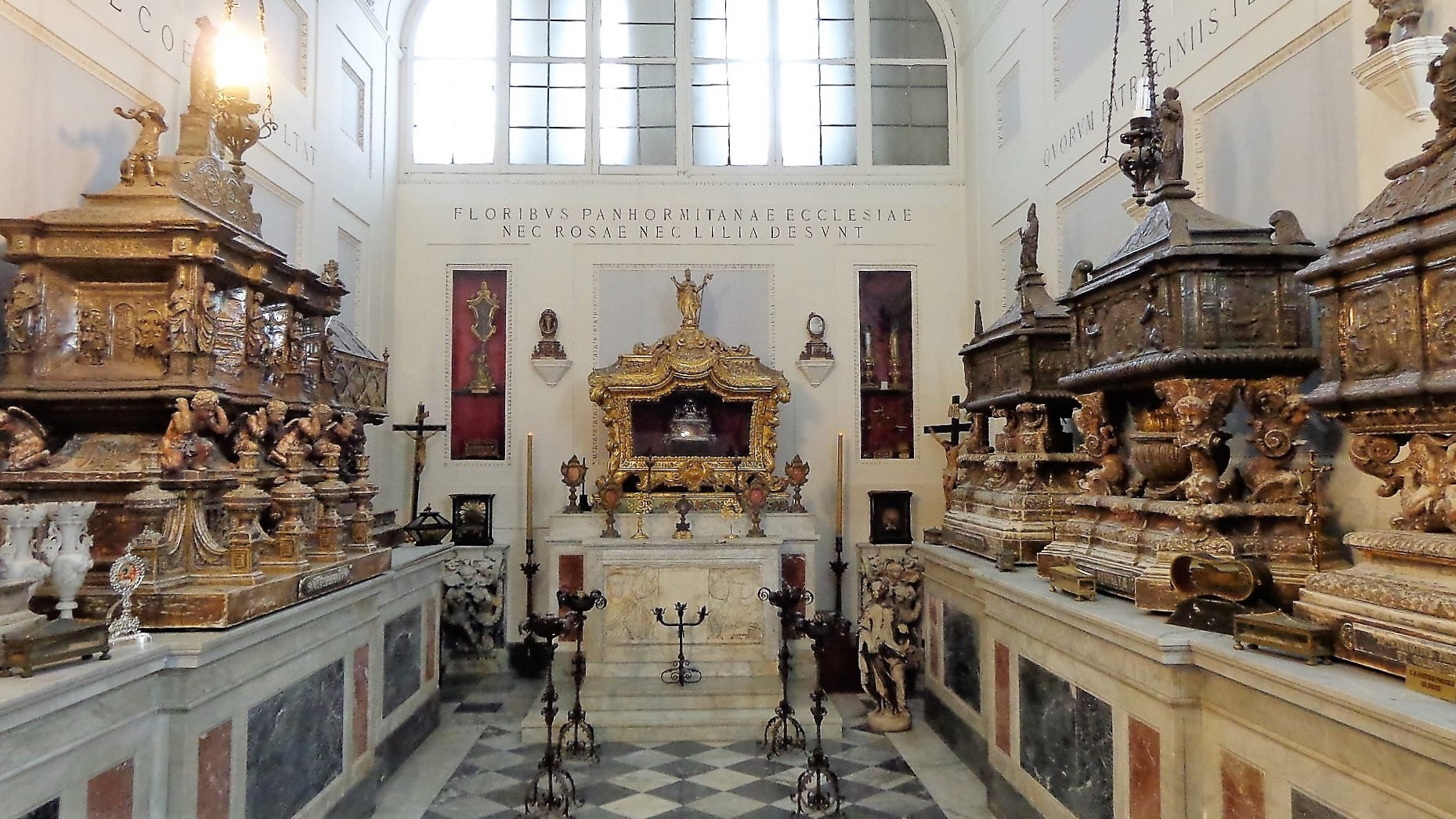 Cappella delle Reliquie